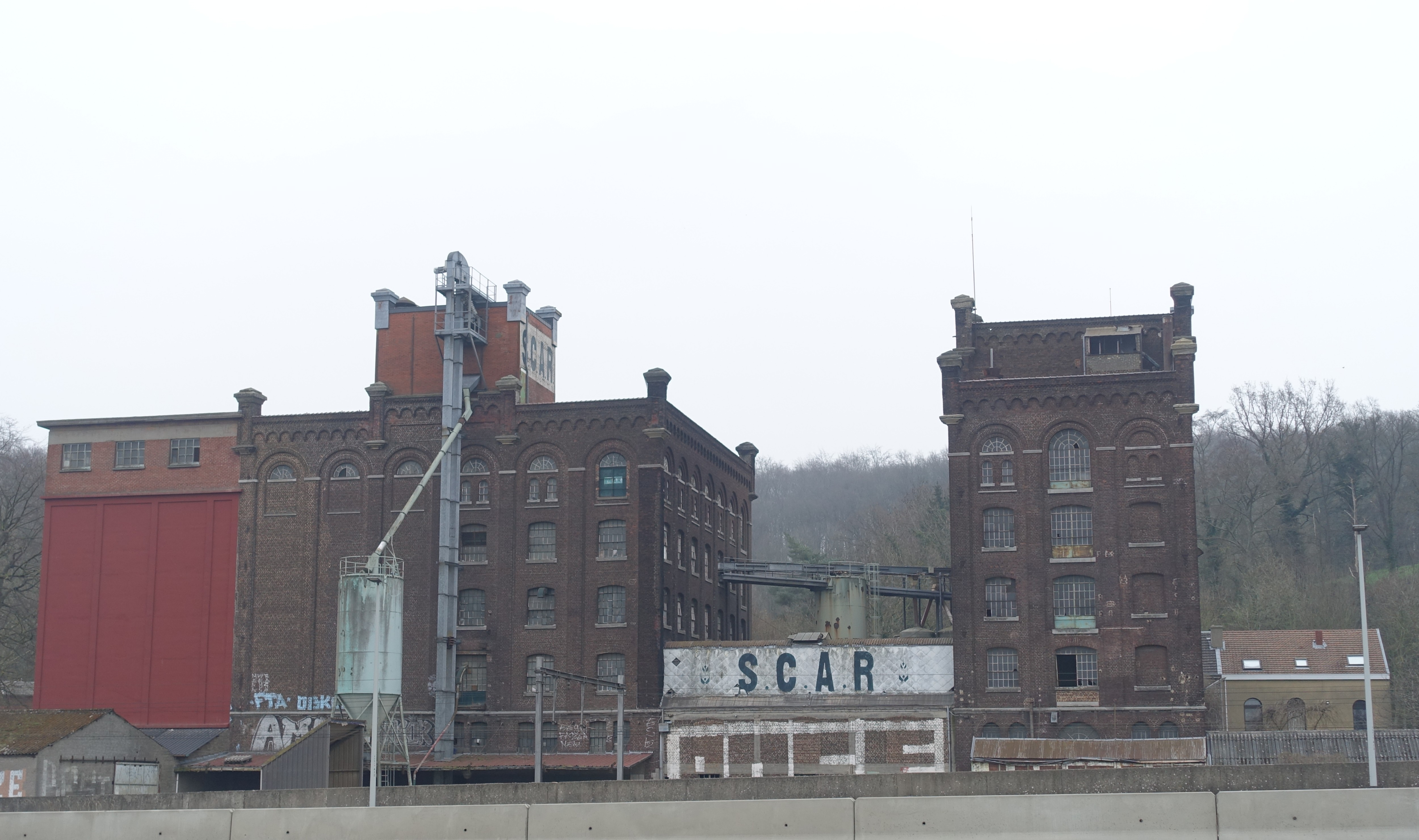 Molen Moureau in neo-middeleeuwse stijl uit 1905, sedert 1980 SCAR (Sociétés Coopératives Agricoles Réunies)